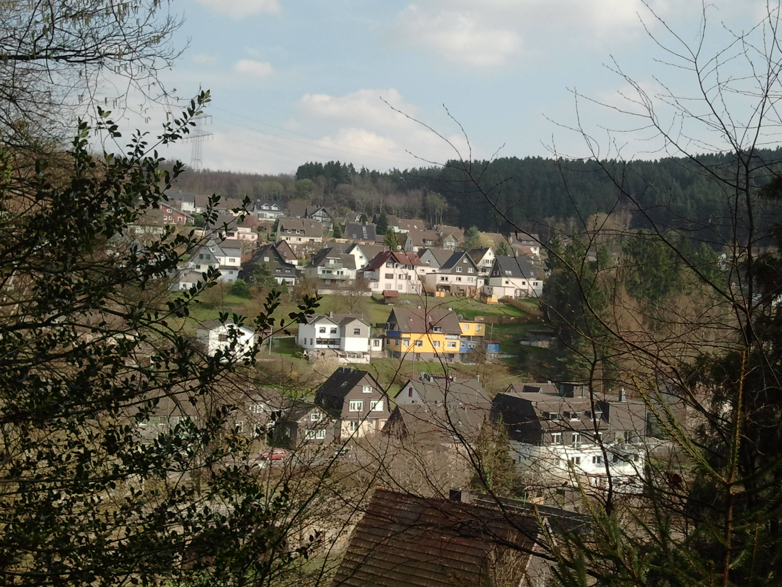 Osberghausen aus Richtung Bingenhof (ehemalige ev. Kirche) gesehen